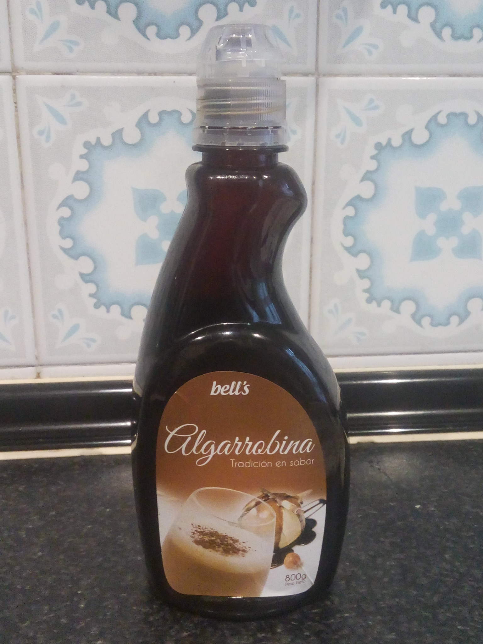 frasco de extracto de algarrobo